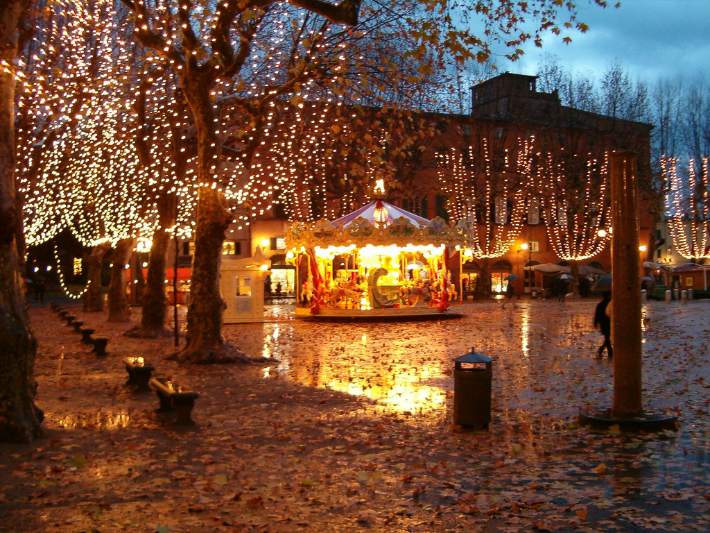 Lucca , Toscana, Italia